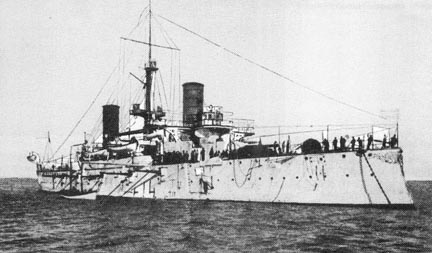 cruiser ARA Belgrano